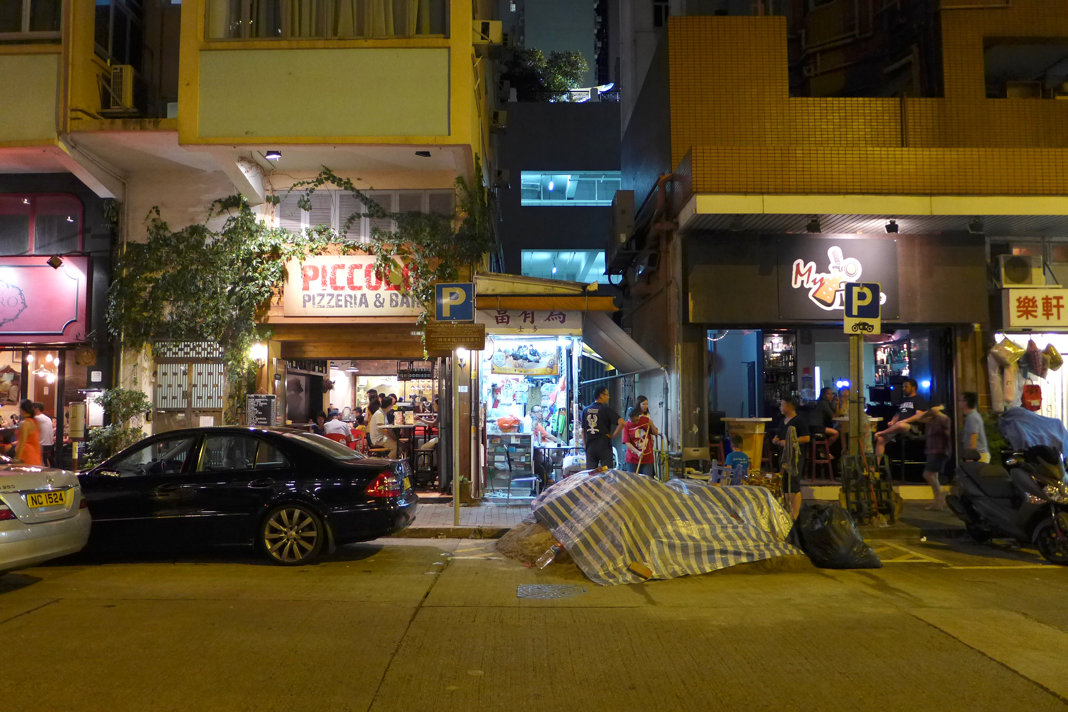 Davis Street Restaurants